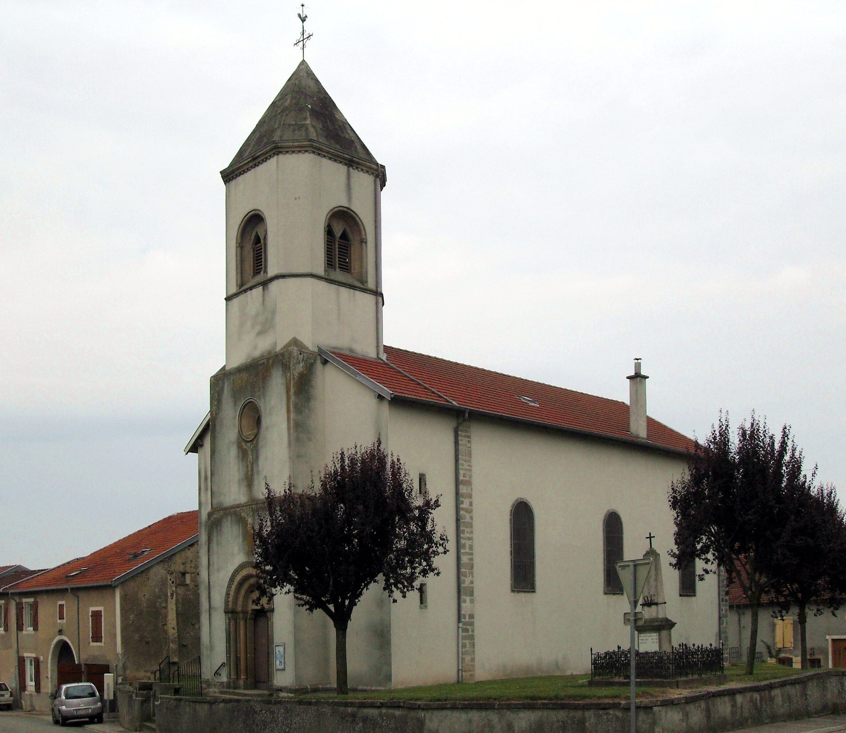 L'église Saint-Didier à Vroville